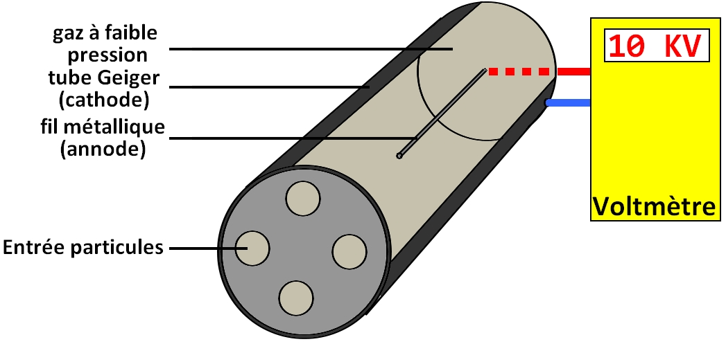 Schématisation d'un compteur geiger